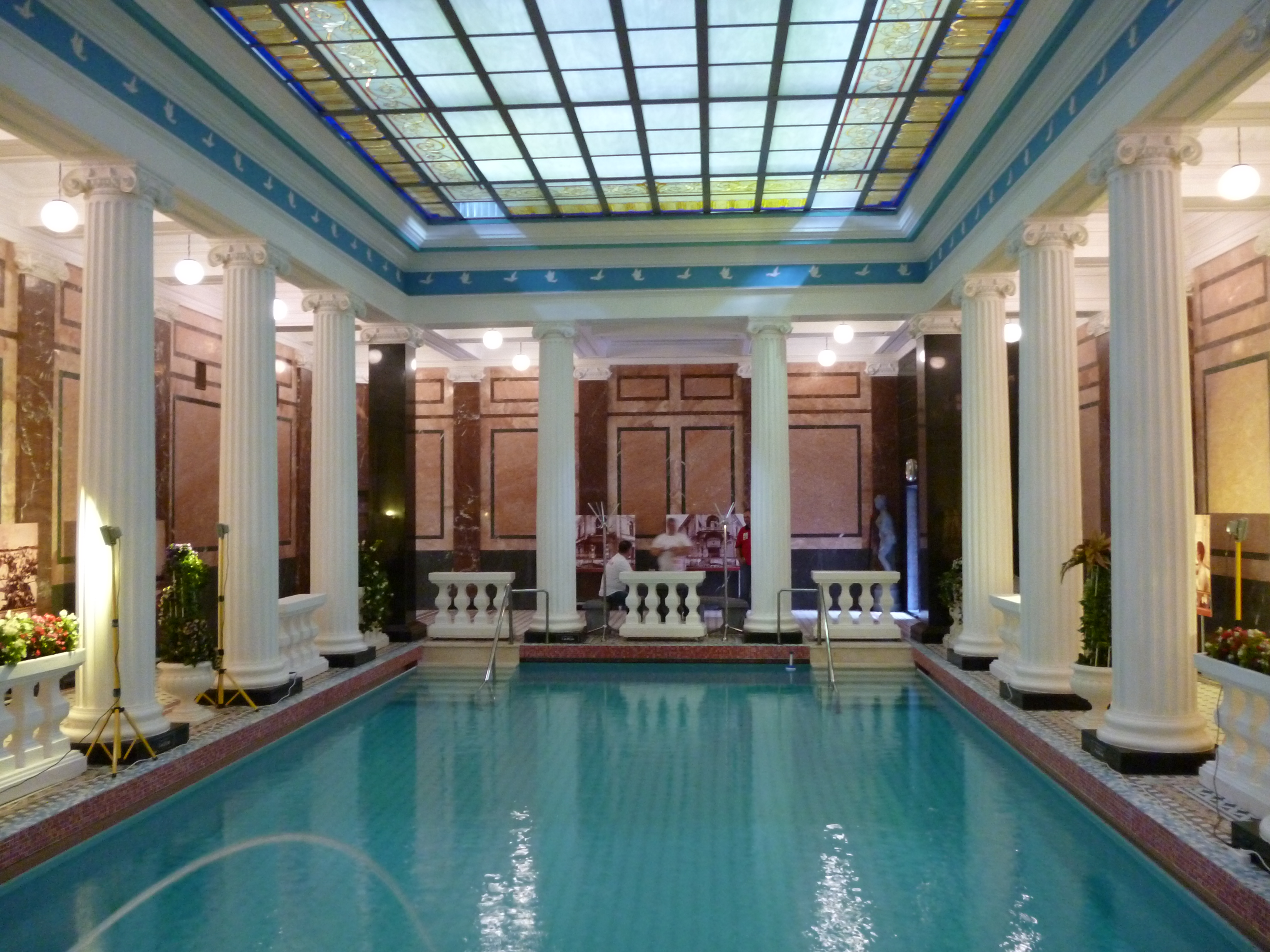 Сандуновские бани: Неглинная ул., дом 14, строение 1А, Мещанский, Центральный округ, Москва